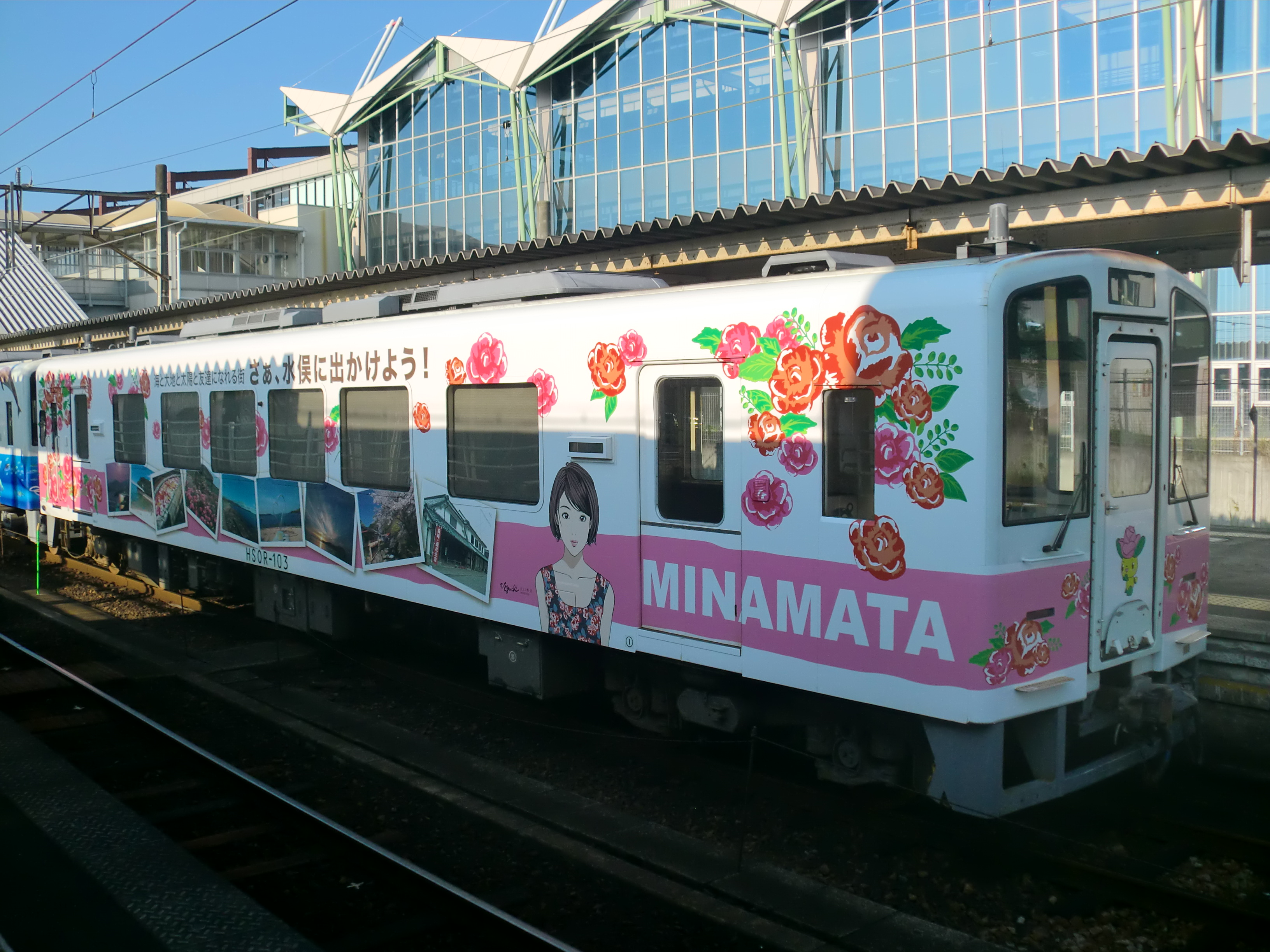 肥薩おれんじ鉄道の車両(HSOR-103)